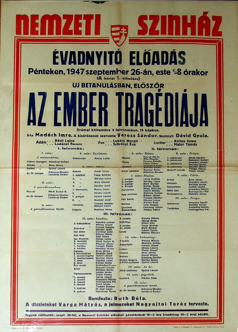 Az ember tragédiája színházi plakátja